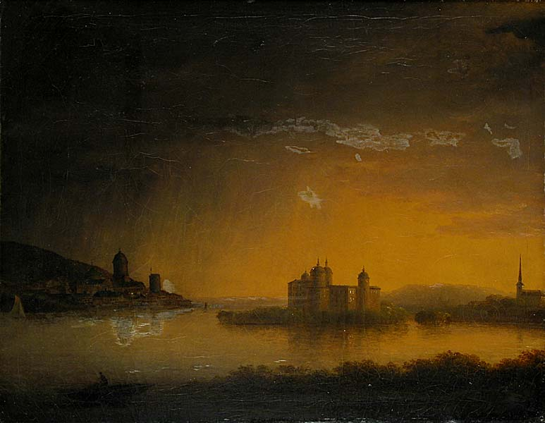 Vy mot Gripsholms slott, 1819)